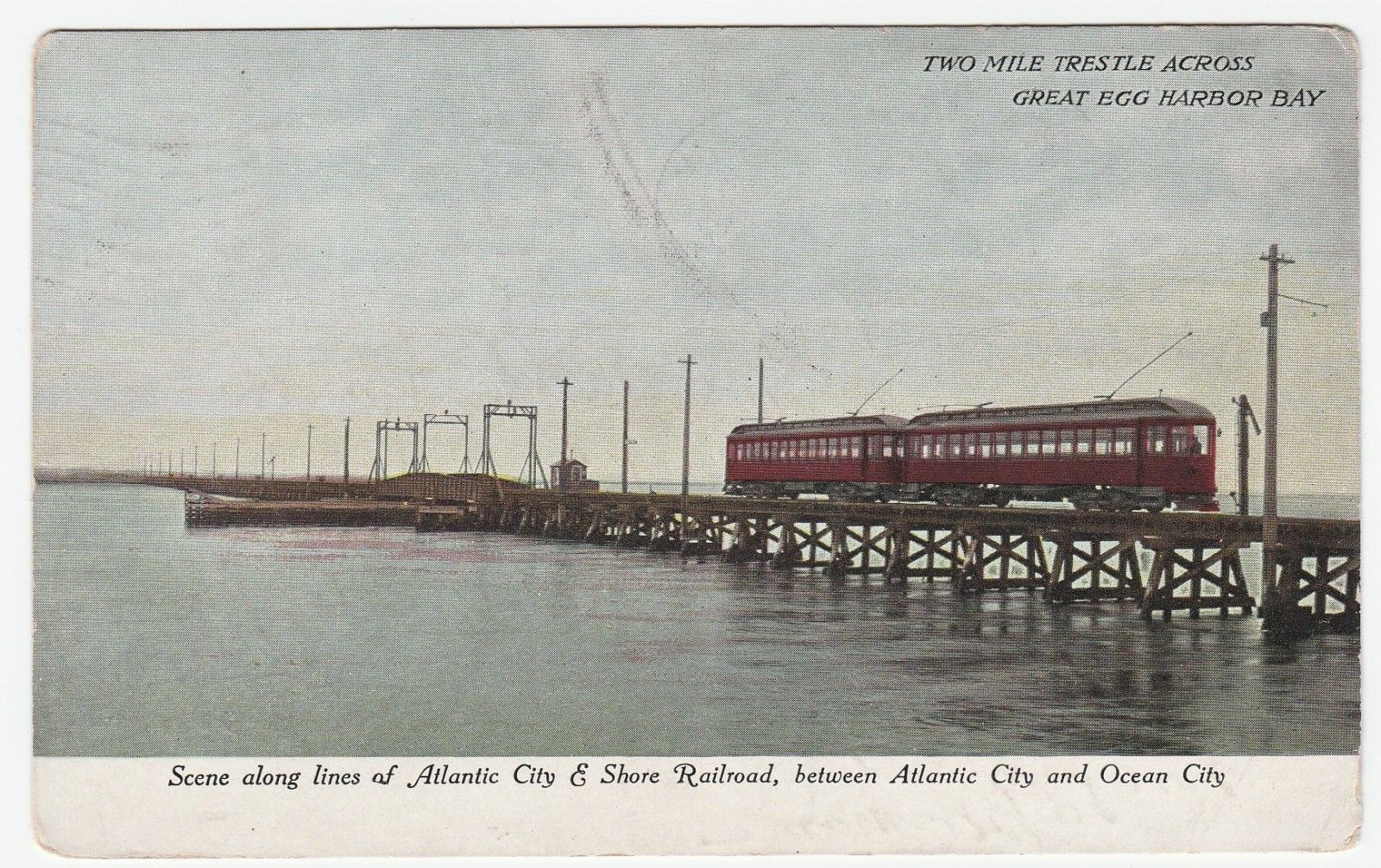 Atlantic City and Shore Railroad - Shore Fast Line. Series of 5 Cards. Atlantic City & Shore Railroad between Atlantic City and Ocean City, New Jersey.